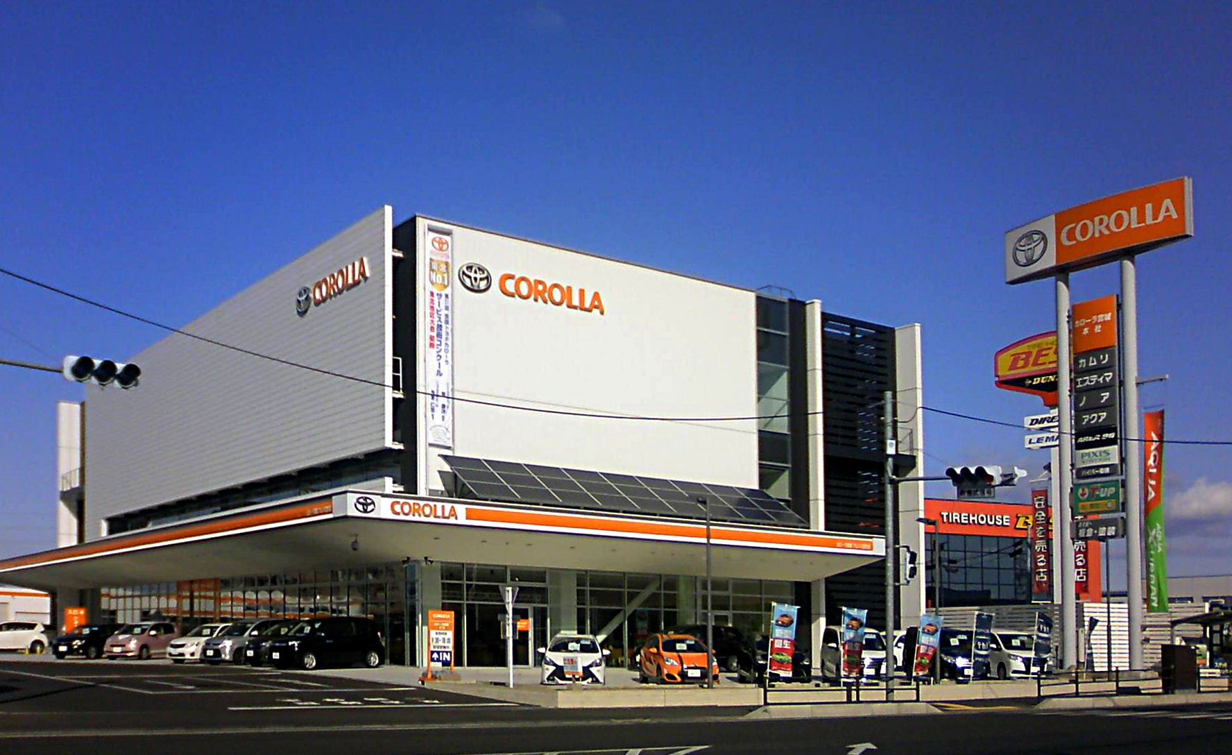 トヨタカローラ宮城本社